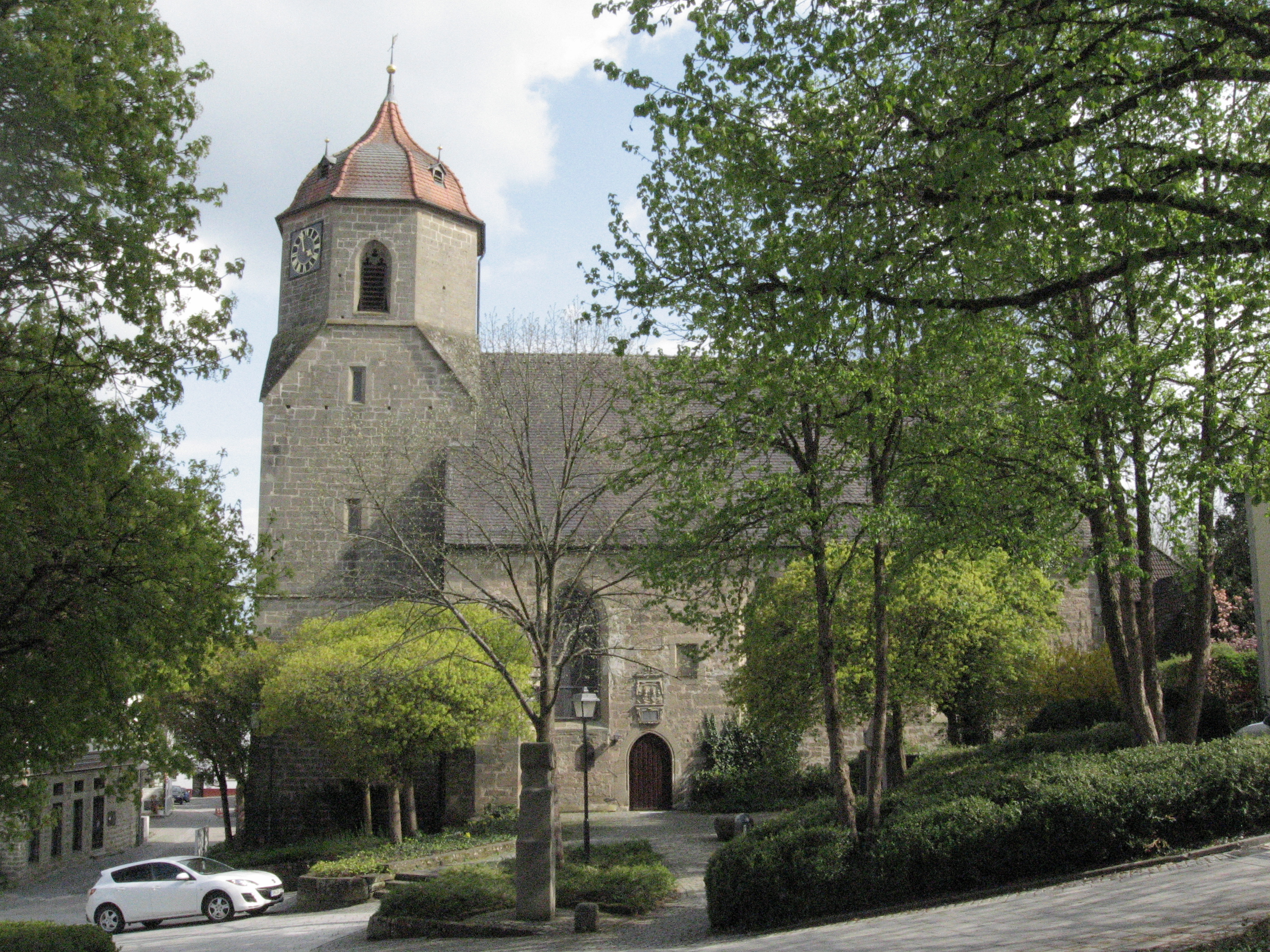 Blick im Frühjahr vom Eingang des Obersontheimer Schlosses auf die evangelische Pfarrkirche des Ortes, davor das Schubartdenkmal.